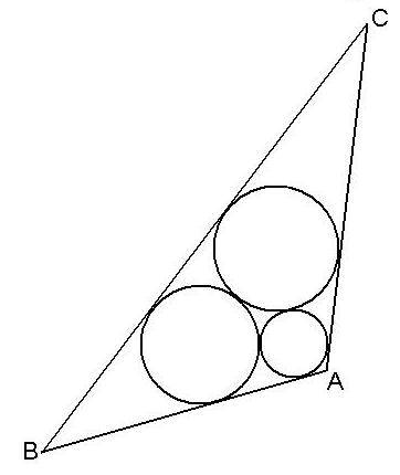 בעיית Malfatti: להעביר שלושה מעגלים משיקים לצלעותיו של משולש נתון וזה לזה. made by: he:משתמש:עוזי ו.